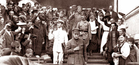 Kérenski durante la Conferencia Estatal de Moscú en agosto de 1917.